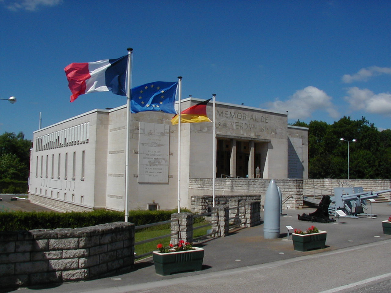 Mémorial de Verdun, musée de la Bataille de Verdun